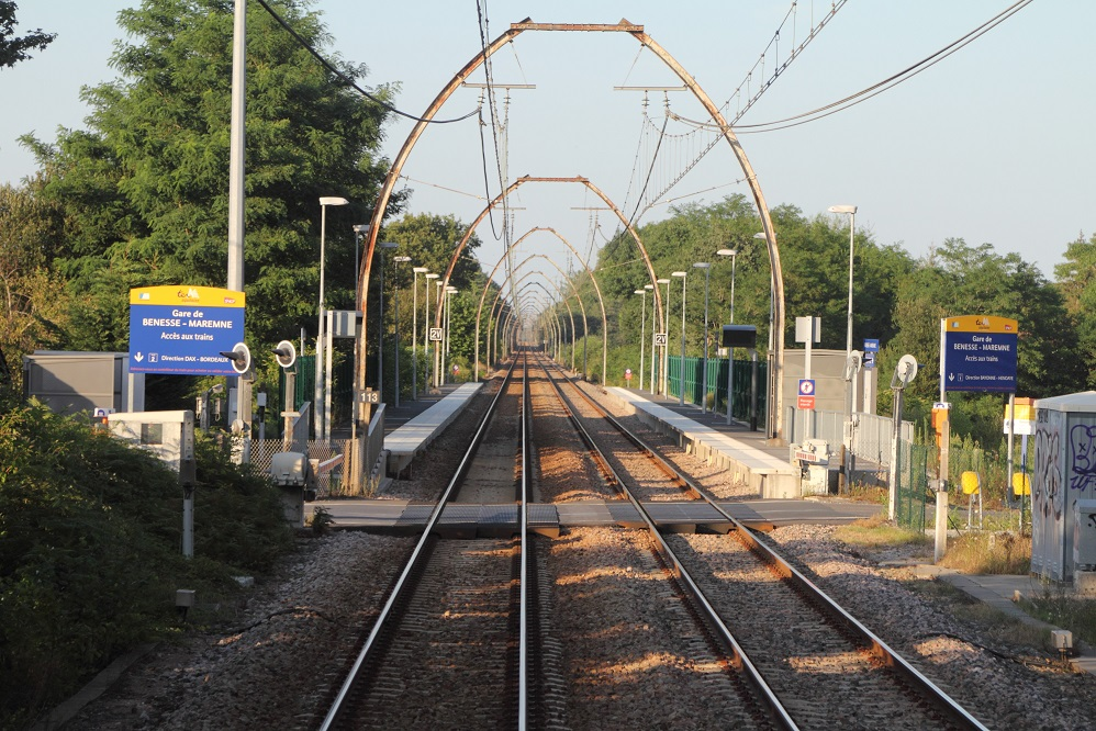 La gare de Bénesse-Maremne en août 2013, Aquitaine, France.